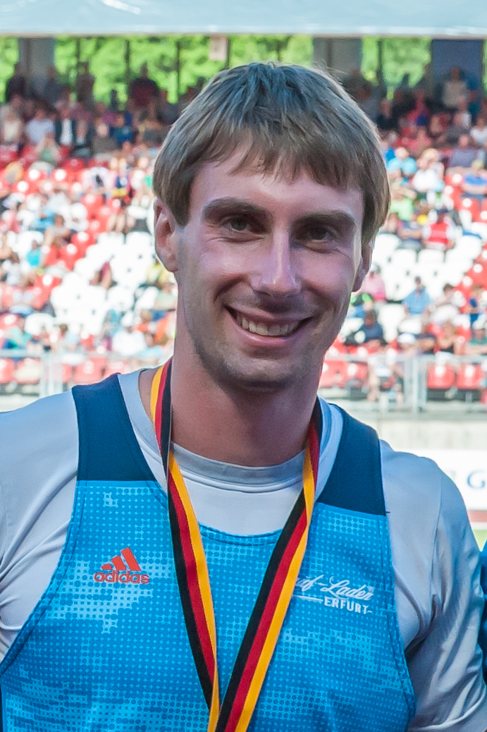 Deutsche Leichtathletik-Meisterschaften 2015: Sebastian Keiner